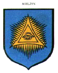 Herb Mielżyna (gmina Witkowo)